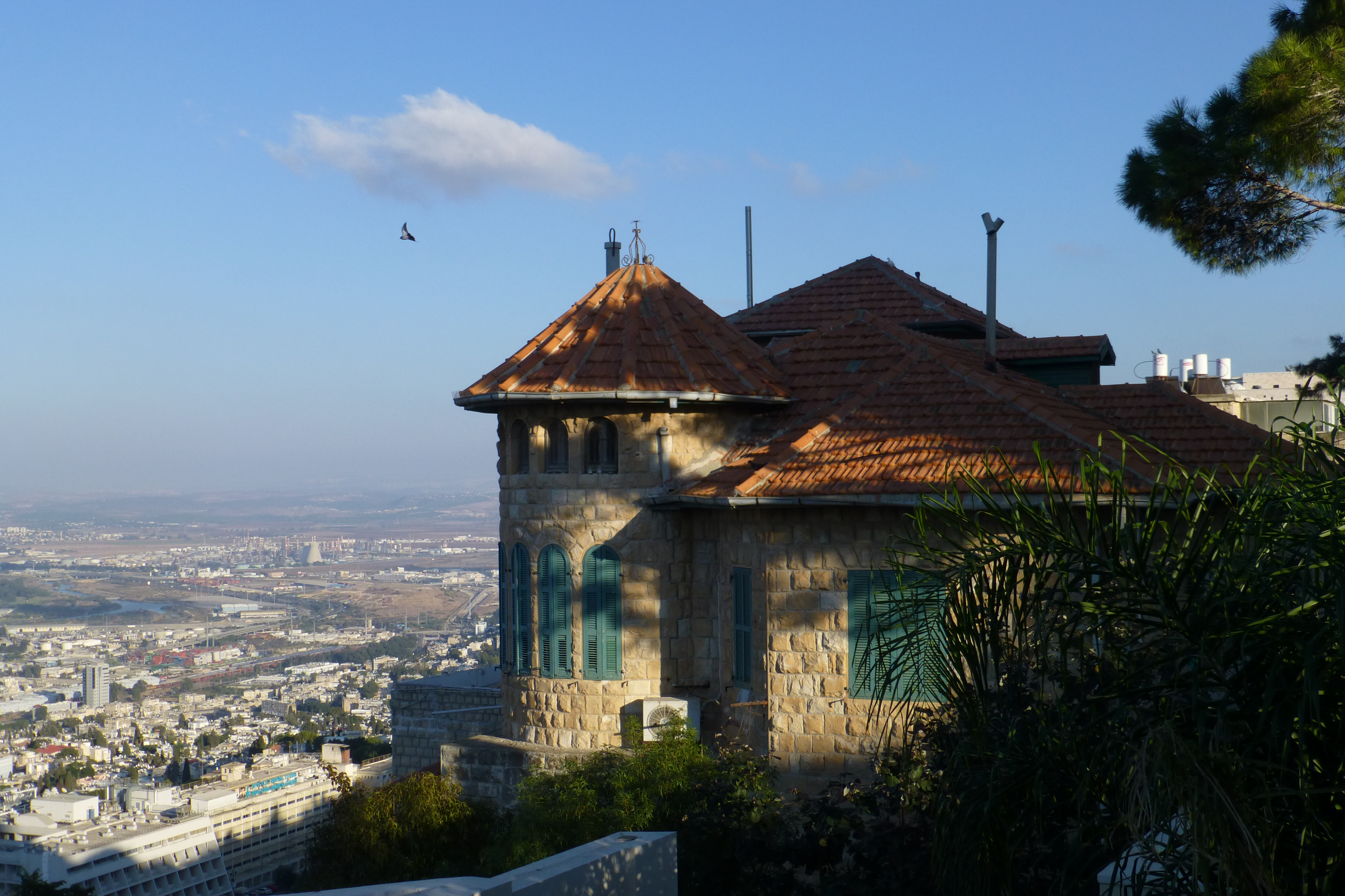 בית הטירה במרכז הכרמל בחיפה